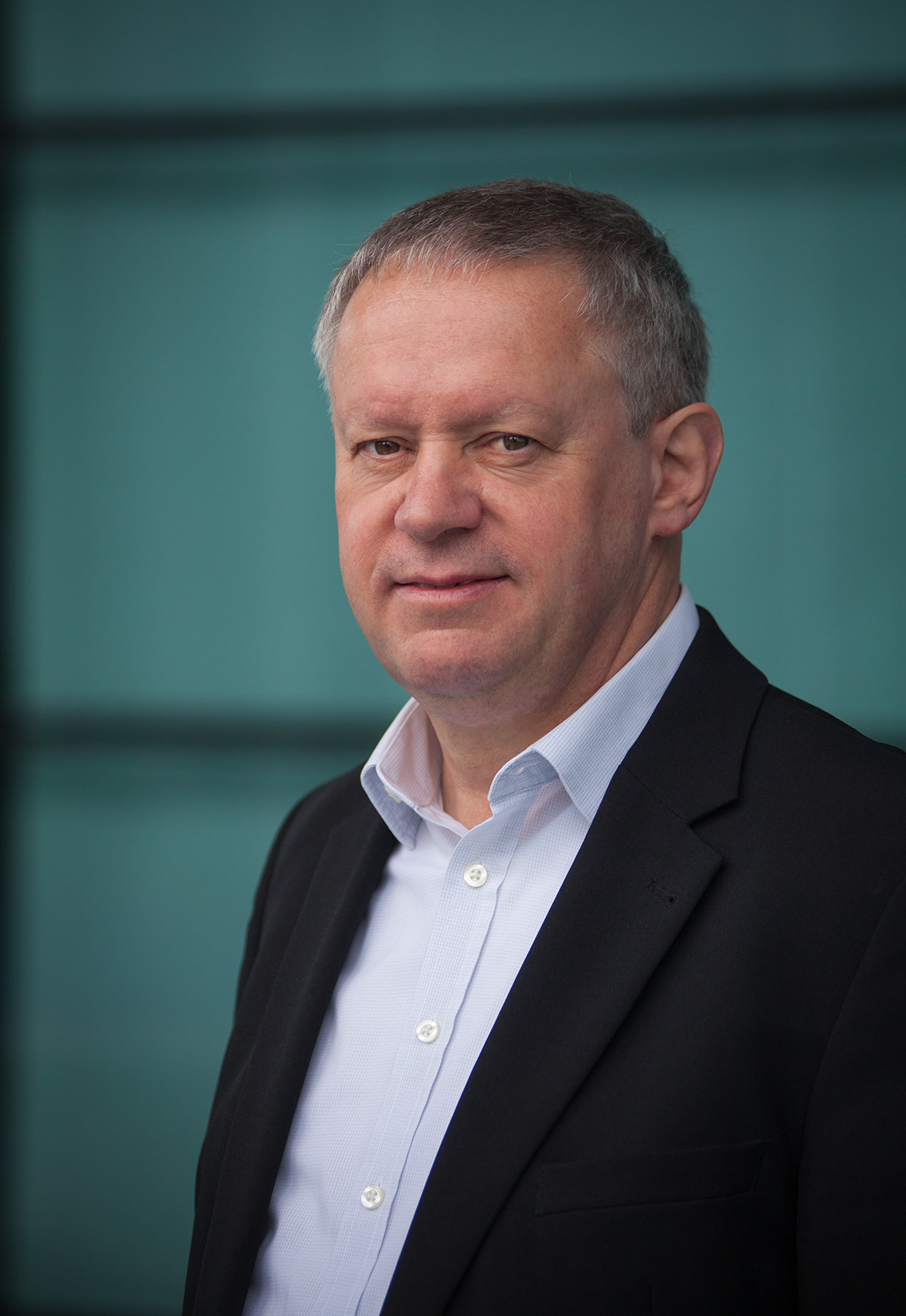 Pierre-Alain Fridez, conseiller national socialiste (JU)